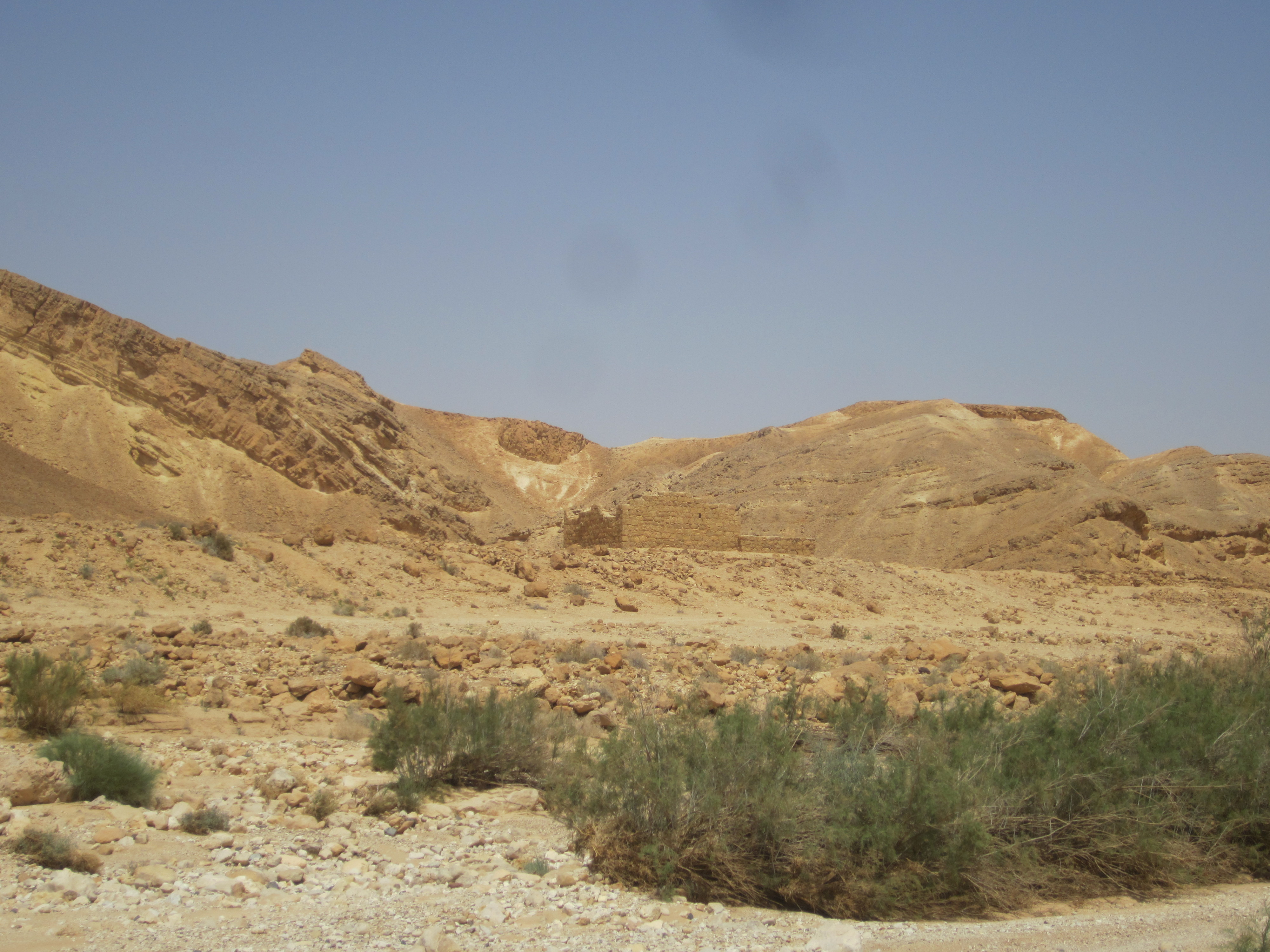 מצד נקרות צולם במסגרת קמפוס דרכים עתיקות בנגב, המחלקה ללימודי ארץ ישראל במכללה האקדמית כנרת